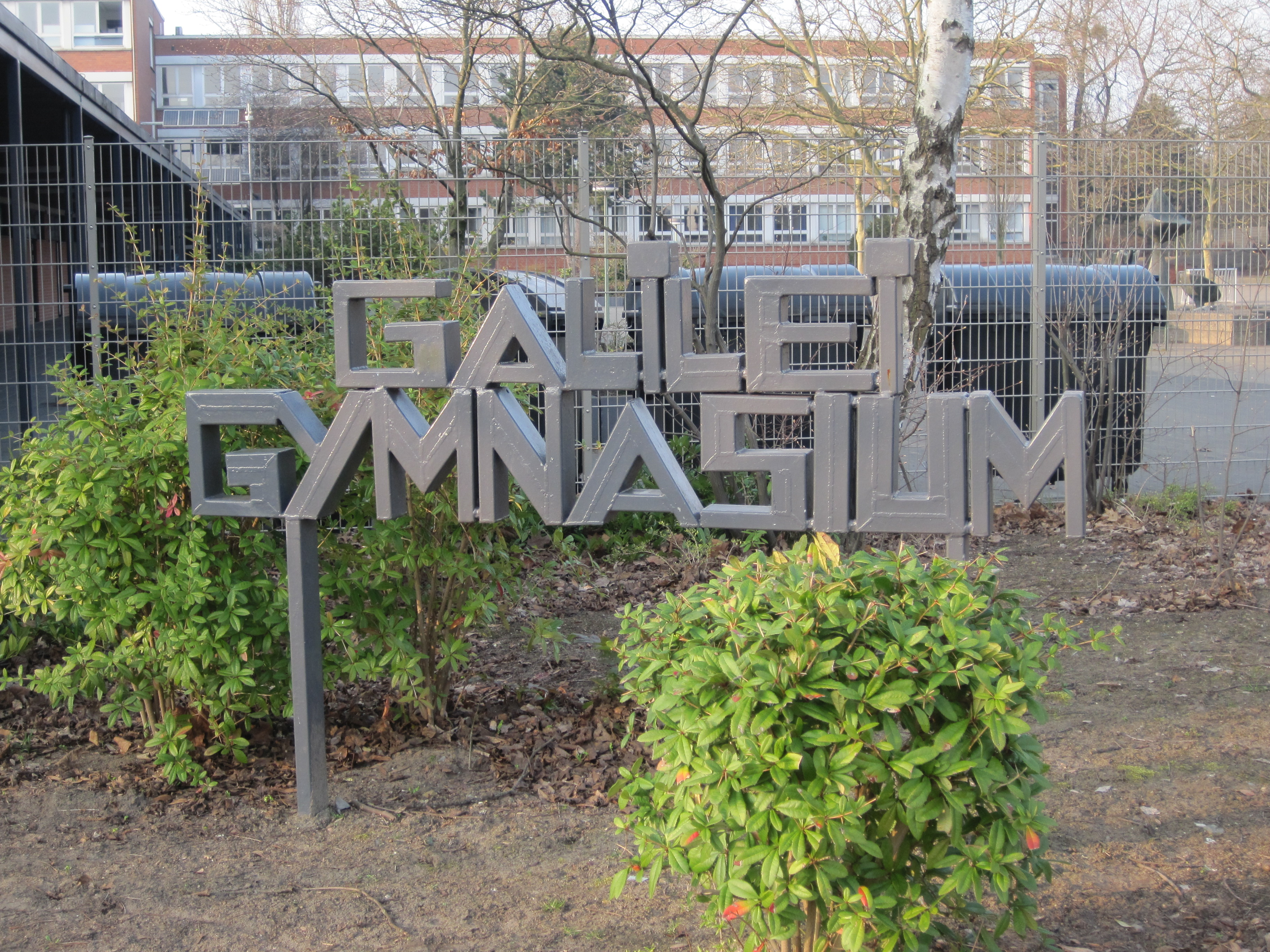 Das Foto zeigt den Schriftzug "Galilei-Gymnasium Hamm" vor der gleichnamigen Schule in Hamm-Bockum-Hövel.